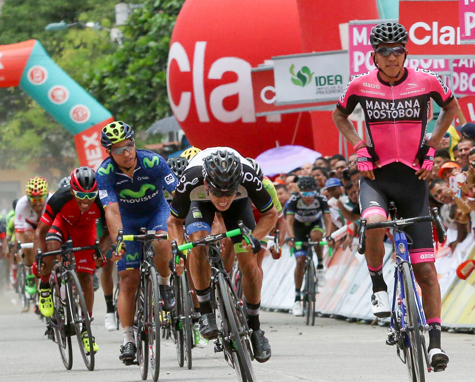 Et.1 Clásico RCN 2016 Sprint final.